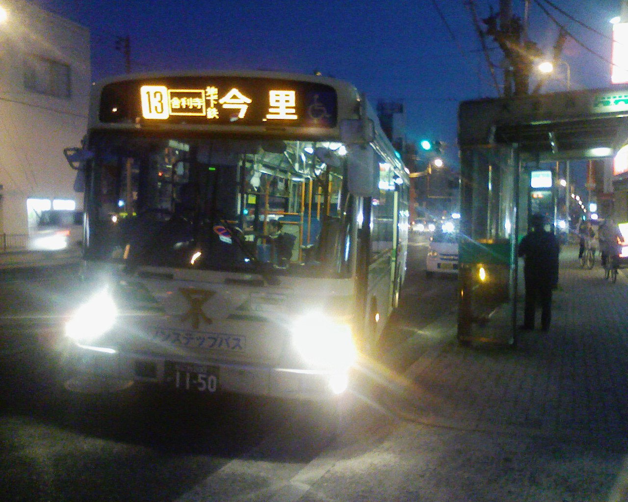 13号系統あべの橋発地下鉄今里行。2010年3月30日18:36、大池橋バス停にて撮影。